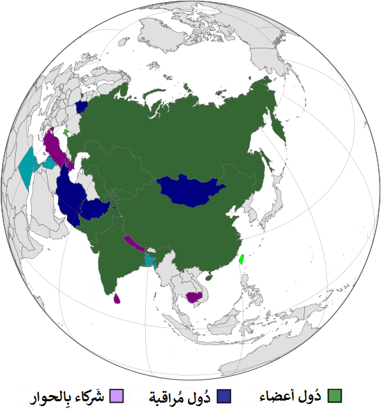 خريطة تُظهر الدول الأعضاء، والمراقبين، والشركاء في منظمة شنغهاي للتعاون.